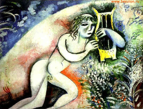 Арфей